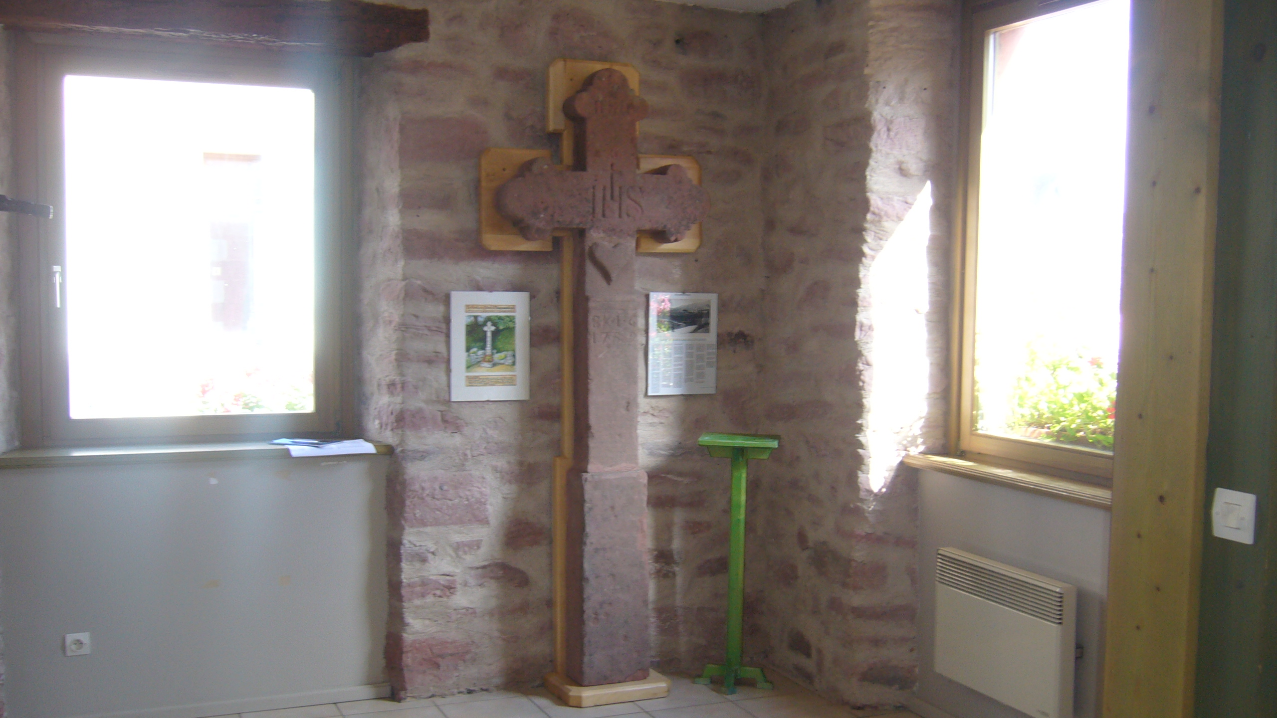 La croix du gibet de Thannekirch située autrefois au Galgenacker ou Galgenrain